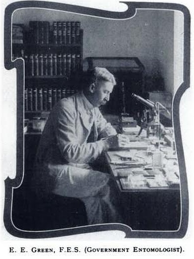 Edward Ernest Green